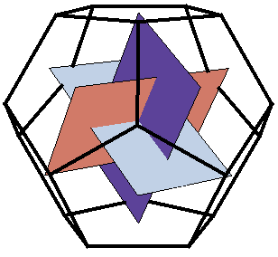 Tres rectángulos aureos perpendiculares entre si, con sus esquinas en los centros de las caras de un Dodecaedro.